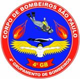 Brasão 4º Grupamento de Bombeiros São Paulo